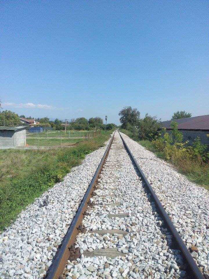 Gjorche Petrov, Skopje, Macedonia (FYROM)